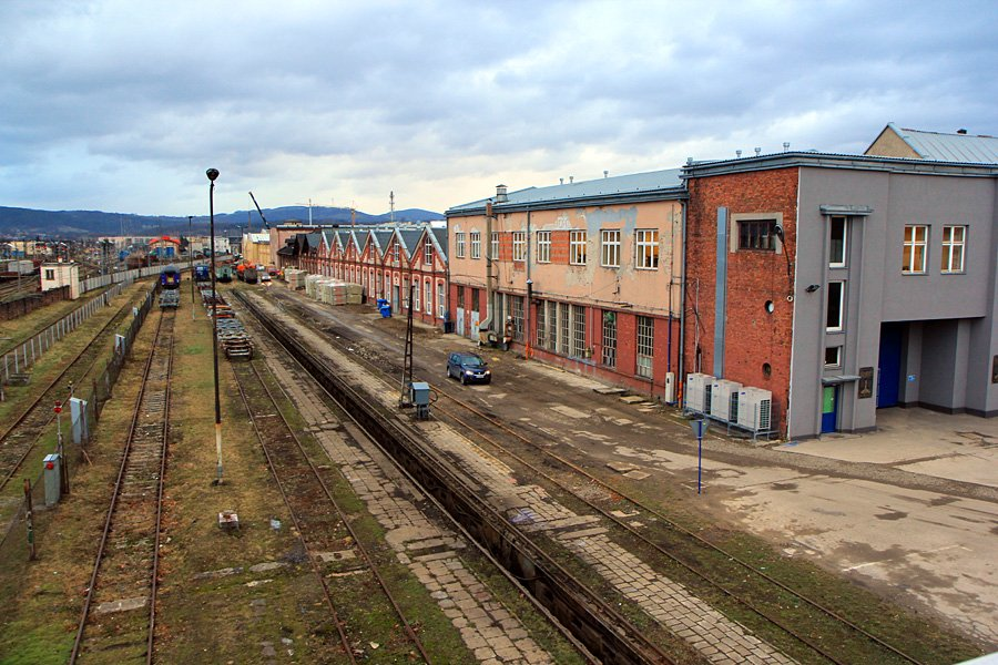 Teren i hale Newagu widziane z kładki łączącej stację kolejową Nowy Sącz z zakładem.